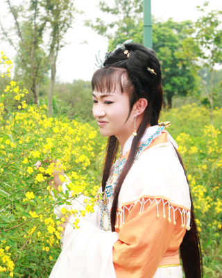 一位越剧妆扮的戏迷。